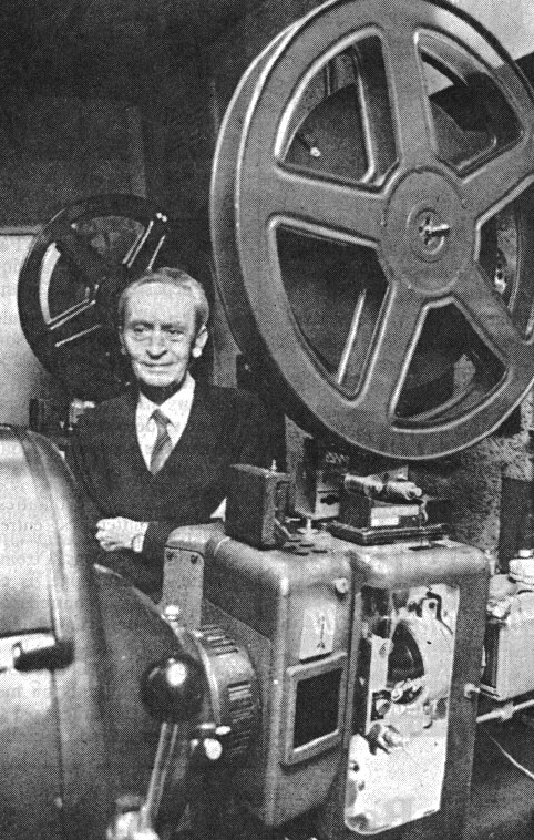 Kursaal - Den Här Arthur Massard